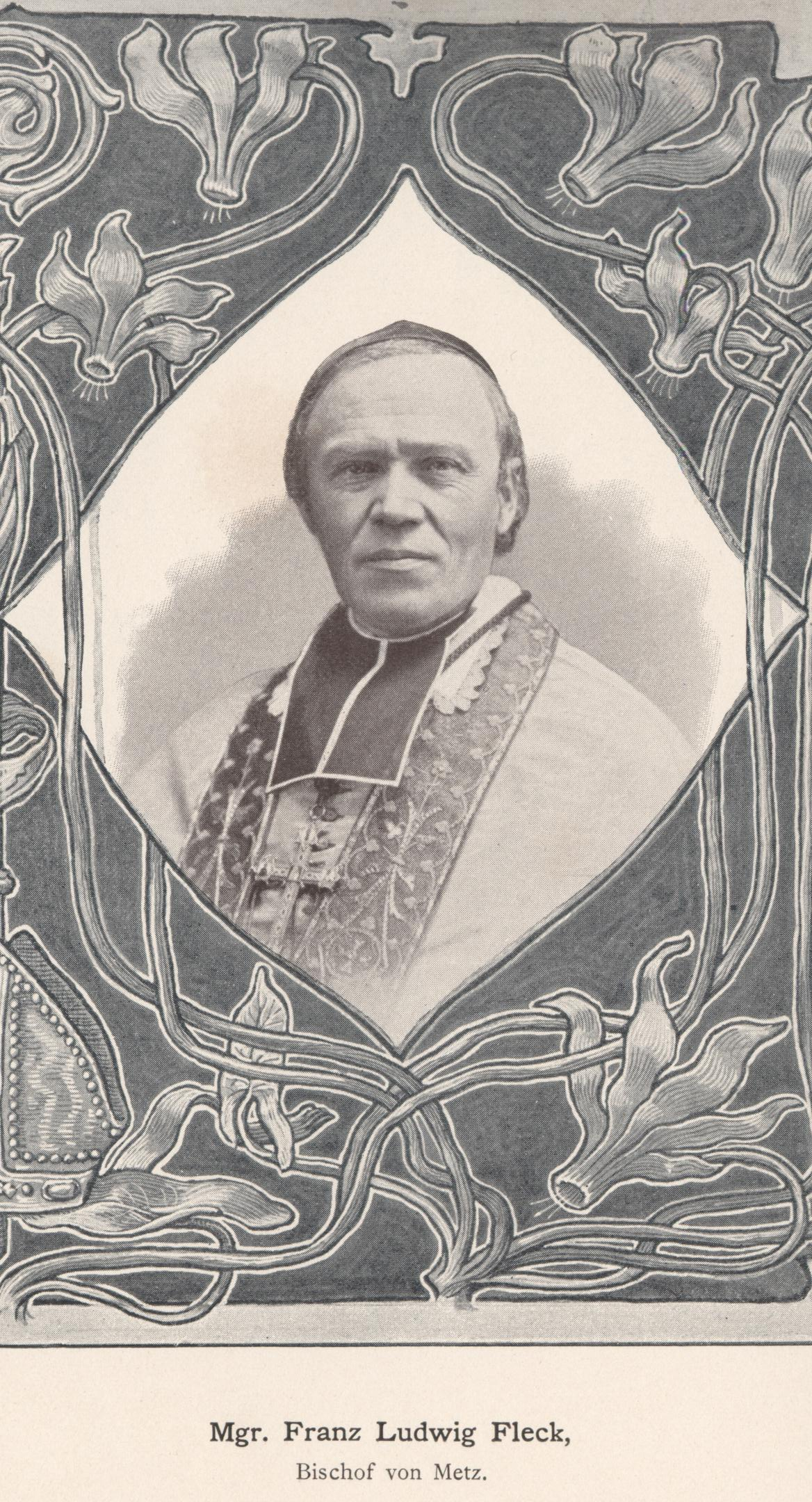 Bischof Franz Fleck, Metz